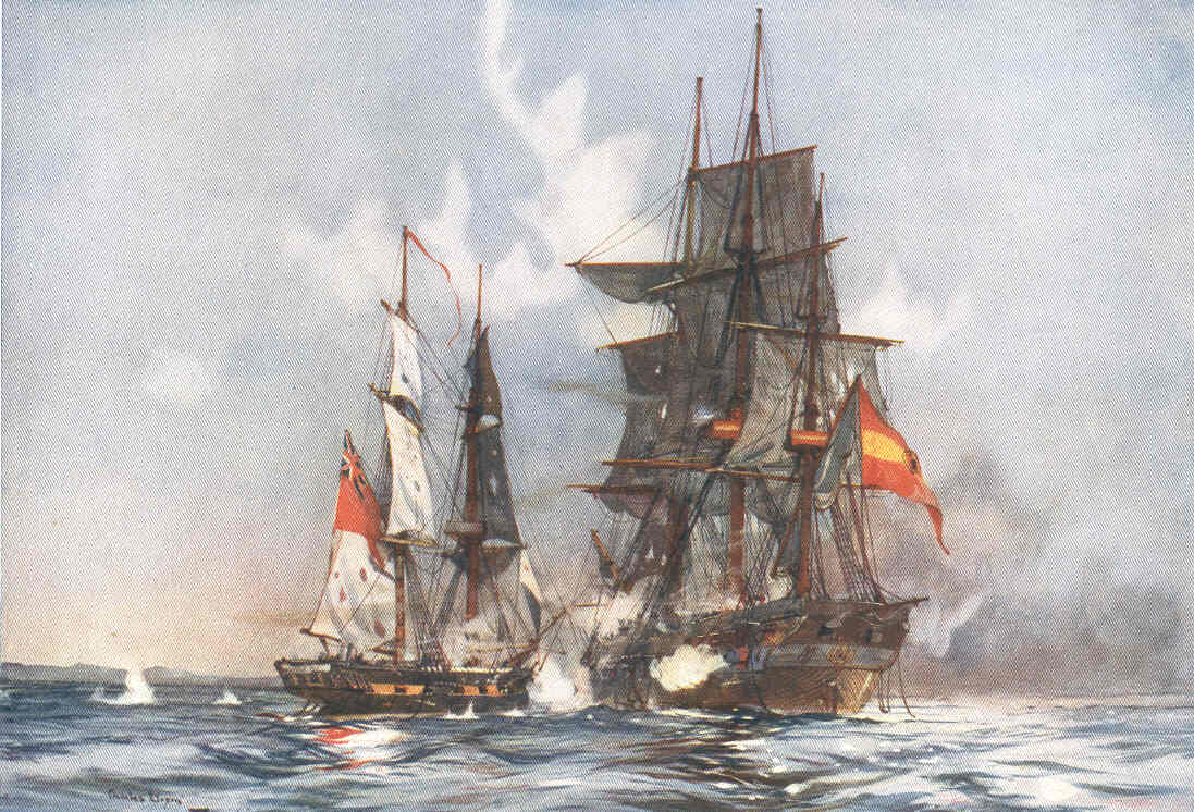 La capture du Gamo par le Speedy. Huile sur toile de Charles Dixon